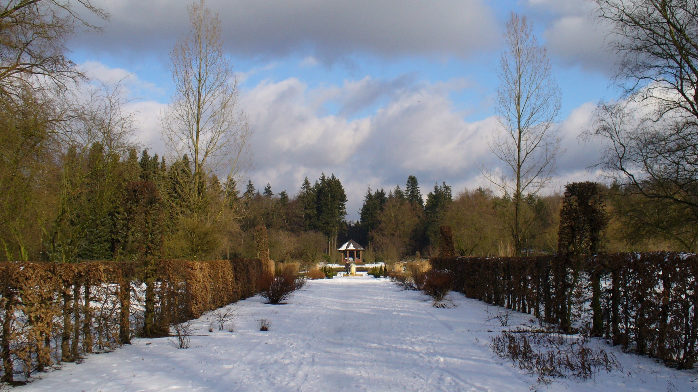 Schulgarten im Winter